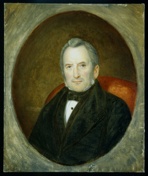 Portrait of Georges-Barthélemi Faribault